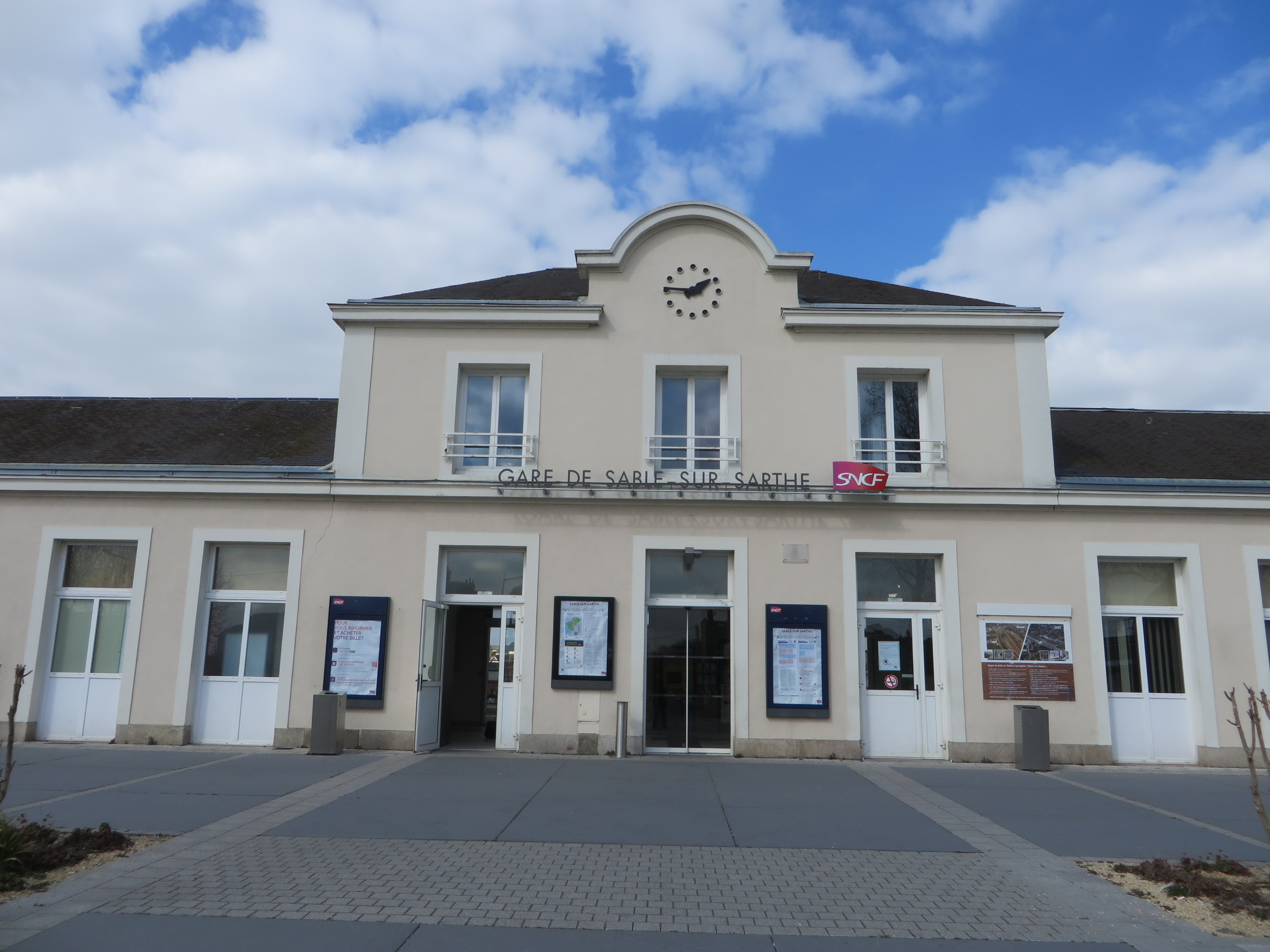 Bâtiment voyageurs et parvis de la gare de Sablé-sur-Sarthe.